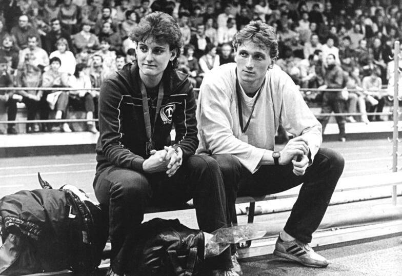 Andreas Oschkenat, Cornelia Oschkenat ADN-ZB Weisflog 7.2.87 Bez. Cottbus: Leichtathletik-DDR-Hallenmeisterschaften in Senftenberg- Einen "Doppelsieg" errang das Ehepaar Oschkenat (beide SC Dynamo Berlin) auf der 60-m-Hürdenstrecke. Adreas gewann in 7,83 s, Cornelia erreichte 7,86 s.